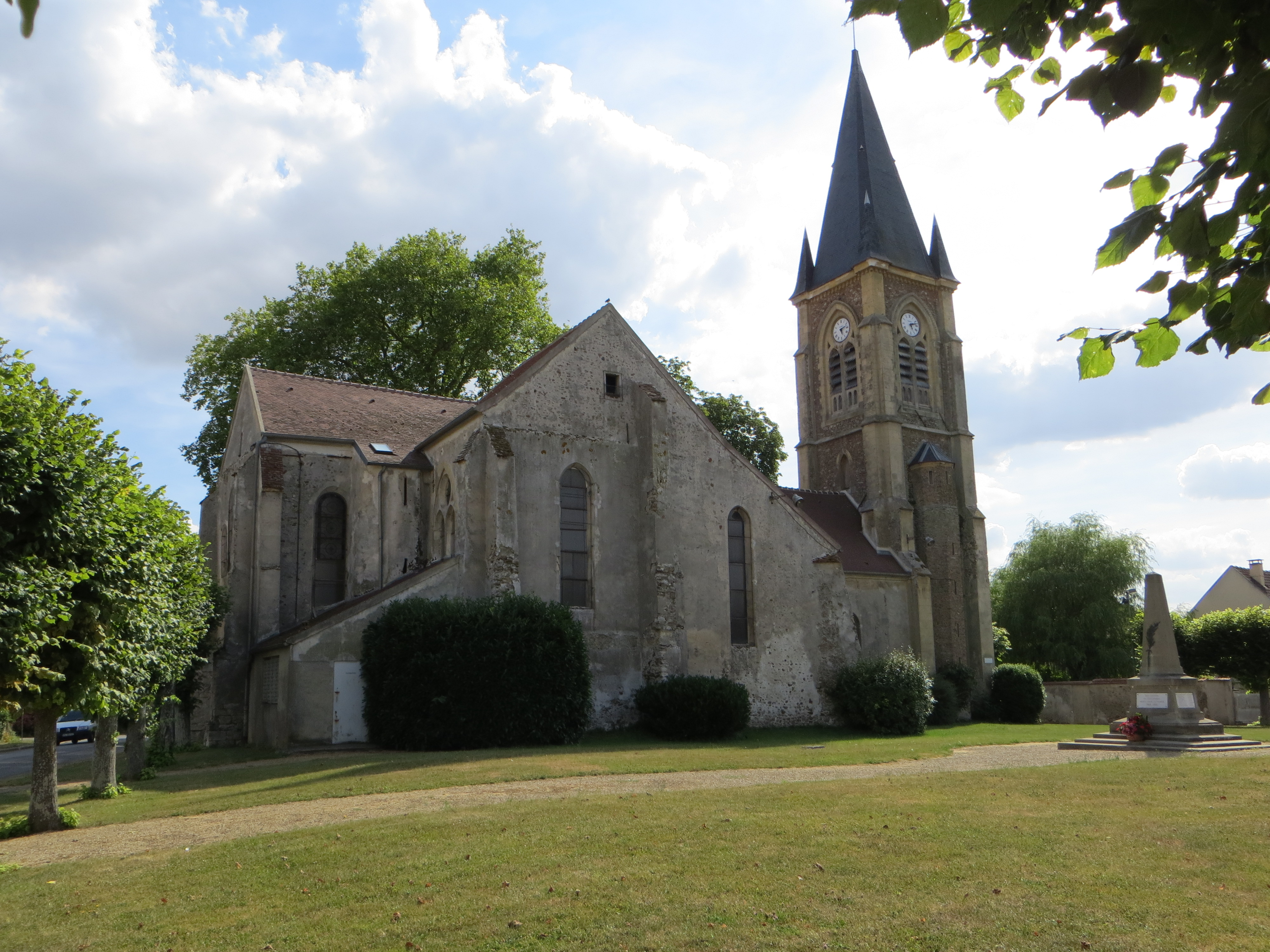 Église et monument aux morts de Coulommes